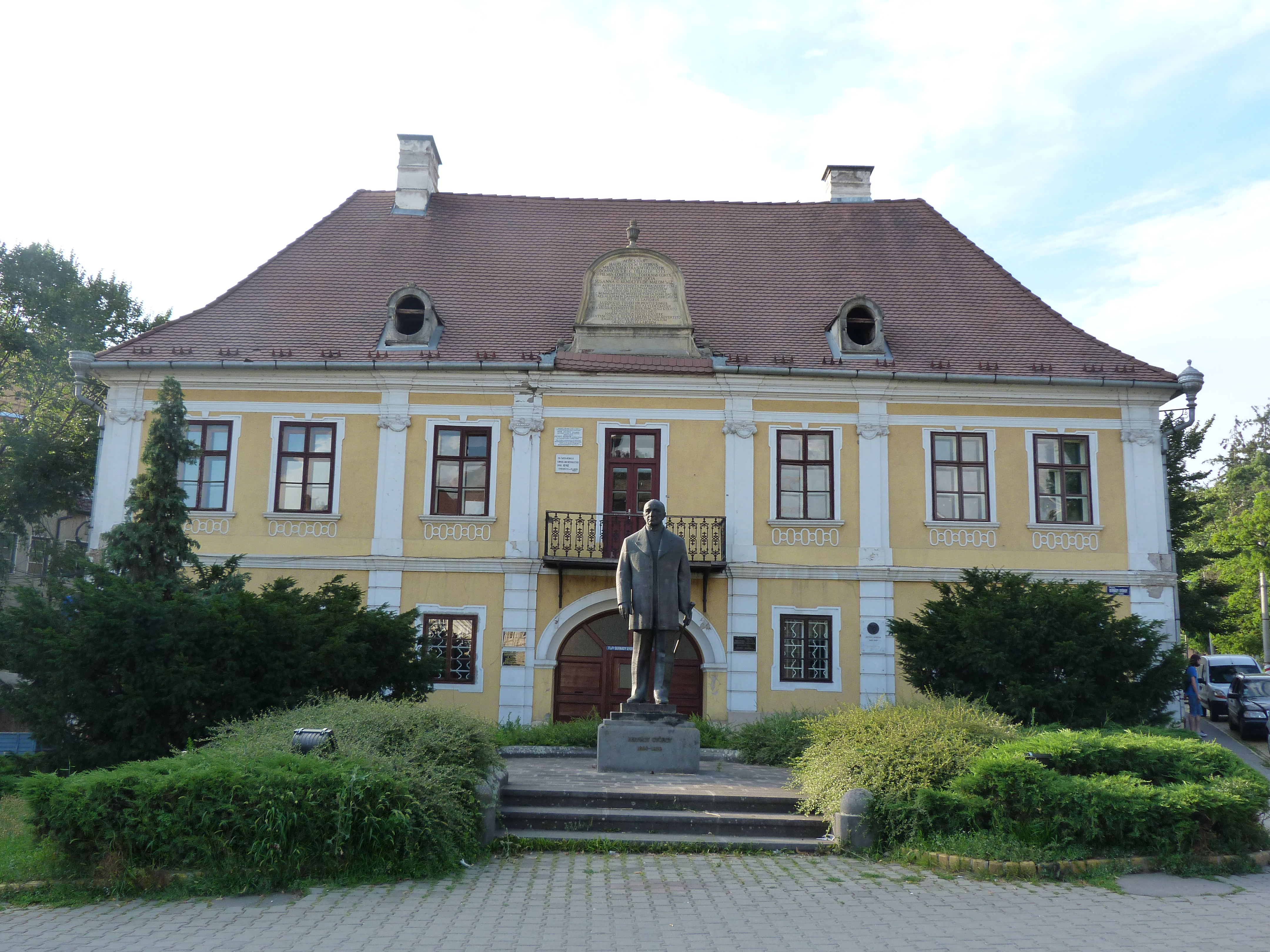 A felvétel 2013. július 11 -én csütörtökön készült Marosvásárhelyen. Bernády György, Marosvásárhely polgármesterének háza. ©© Published under Creative Commons in the Metapolisz DVD line. All of the photos and vids in the Metapolisz DVD line are under Creative Commons and can be used even for commercial – for profit – purposes. Recommended Citation Derzsi Elekes Andor: Metapolisz DVD line